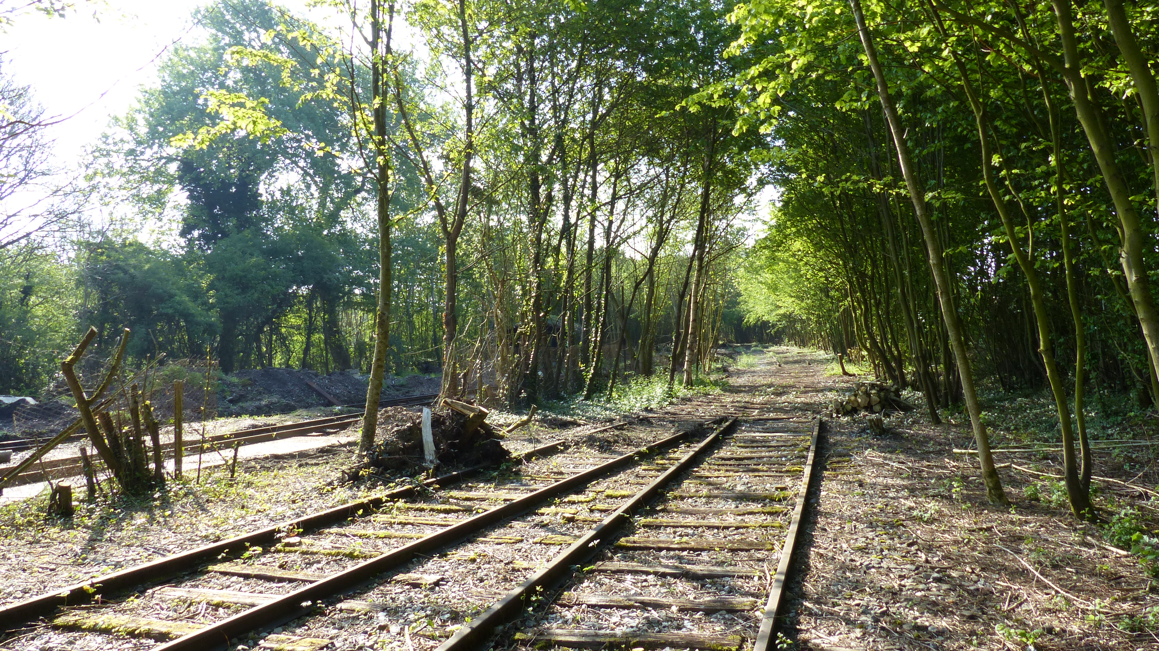 Au centre, vestiges de la voie de la ligne de Saint-Omer-en-Chaussée à Vers en gare de Crèvecœur-le-Grand, à gauche, les nouvelles voies métriques posées par le MTVS en 2014